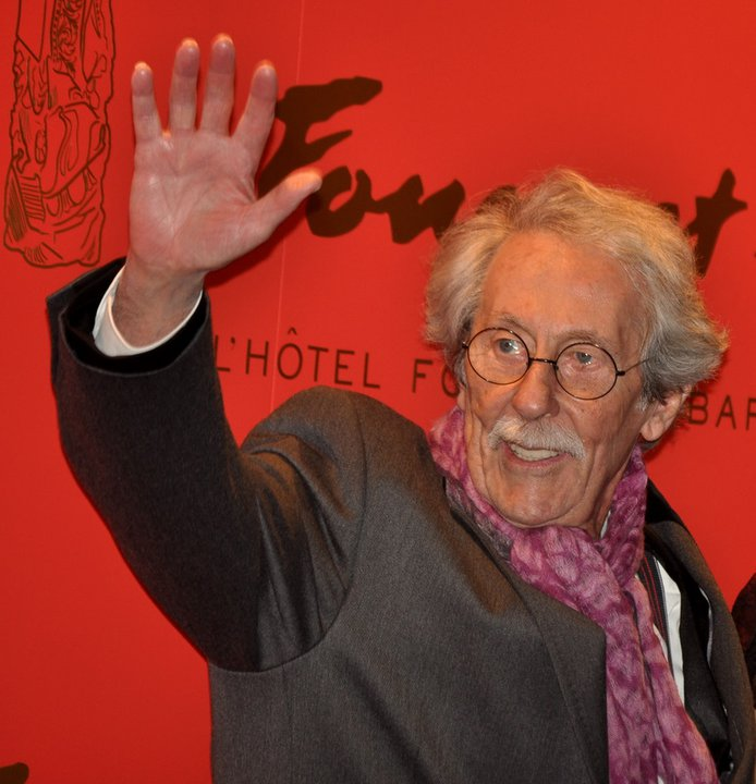 Jean Rochefort à la cérémonie des César du cinéma